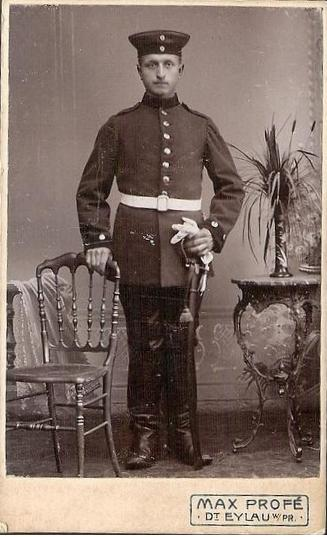 Żołnierz 59. regimentu artylerii w Iławie w 1905 r.